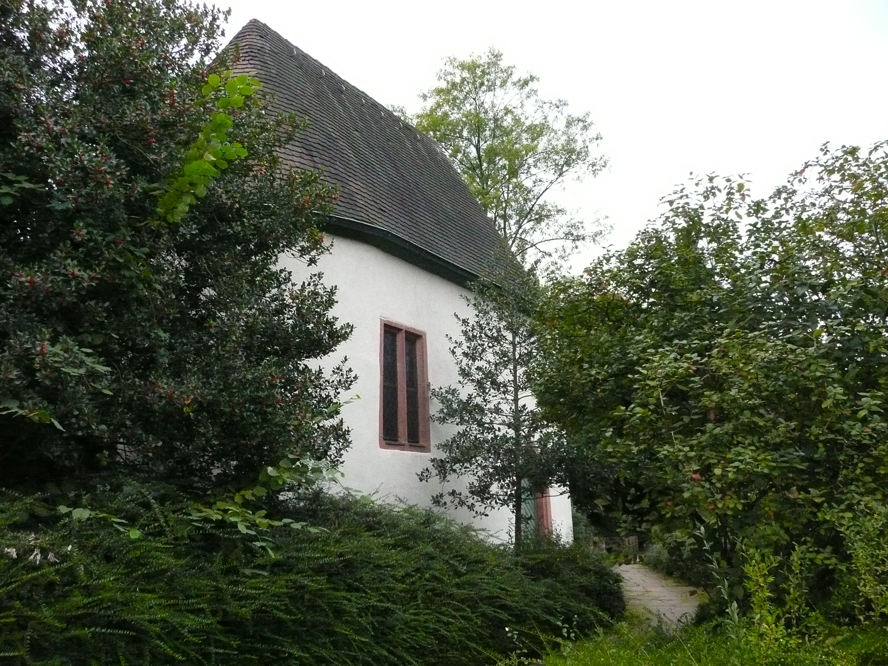 Gutleuthofkapelle im Heidelberger Stadtteil Schlierbach (Blick von Osten)